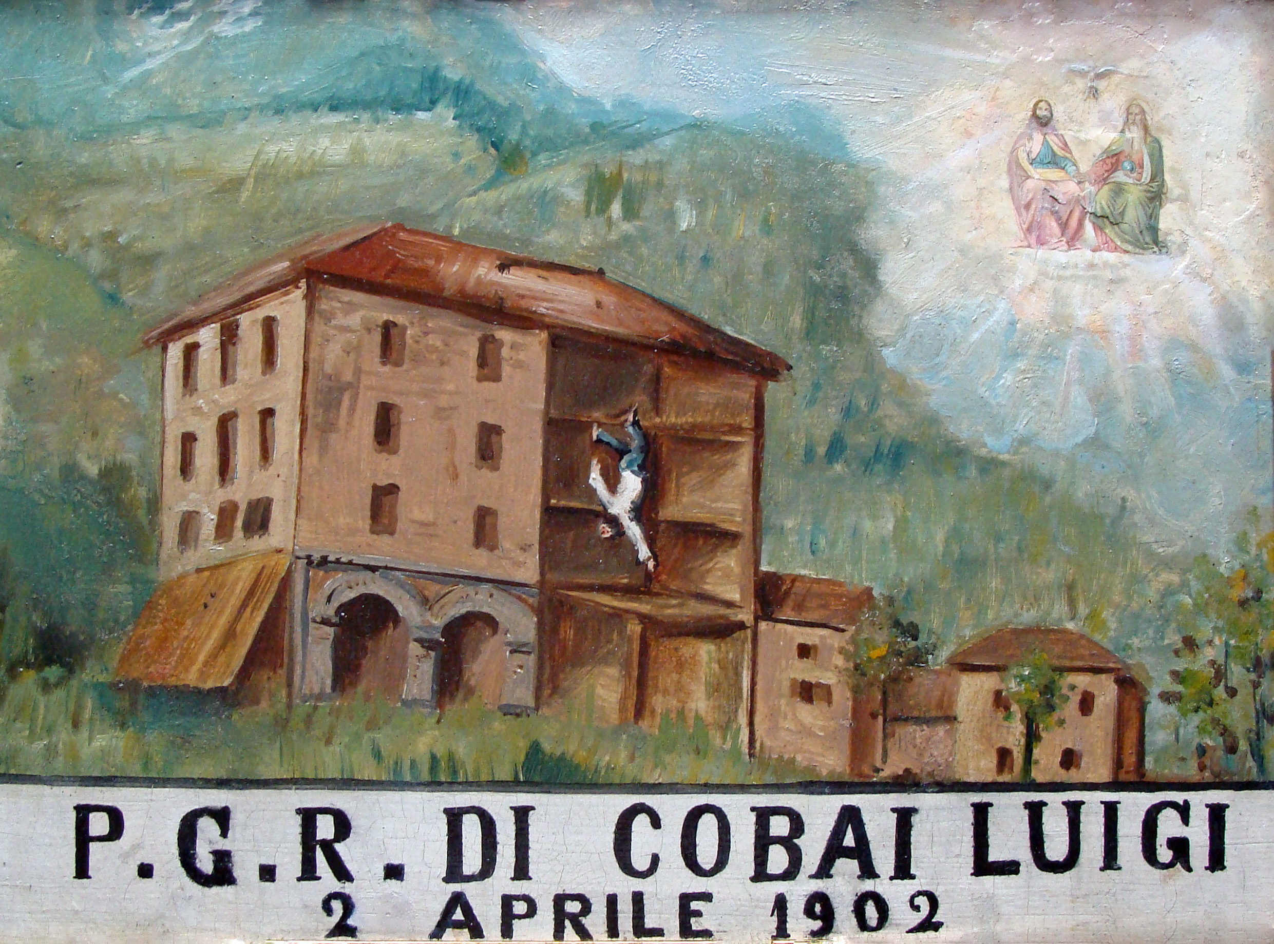 ex-voto de Luigi Cobai (Louis Conai) représentant le palazzo Cobai à Monteaperta (commune de Taipana, Italie). Louis Cobai est miraculeusement sauvé en tombant du toit le 2 avril 1902.